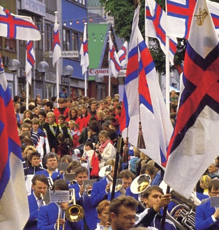 Faroese flag at Ólavsøka on Niels Finsen's street in Tórshavn, Faroe Islands